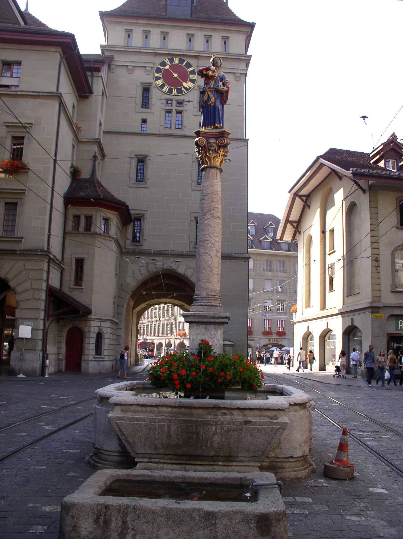 Description: Anna-Seiler-Brunnen mit dem Käfigturm im Hintergrund Source: photo taken by me, September 2005 Photographer: Baikonur